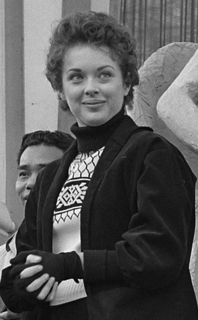 Collectie / Archief : Fotocollectie Anefo Reportage / Serie : [ onbekend ] Beschrijving : Italiaanse filmsterren Rossano Brazzi en Milly Vitale.Opnamen fontein door storten van water in Den Haag Datum : 18 november 1954 Locatie : Den Haag, Zuid-Holland Trefwoorden : acteurs, actrices, filmsterren, toneelspelers Persoonsnaam : Brazzi Rossano, Vitale Milly Fotograaf : Pot, Harry / Anefo Auteursrechthebbende : Nationaal Archief Materiaalsoort : Glasnegatief Nummer archiefinventaris : bekijk toegang 2.24.01.09 Bestanddeelnummer : 906-8516